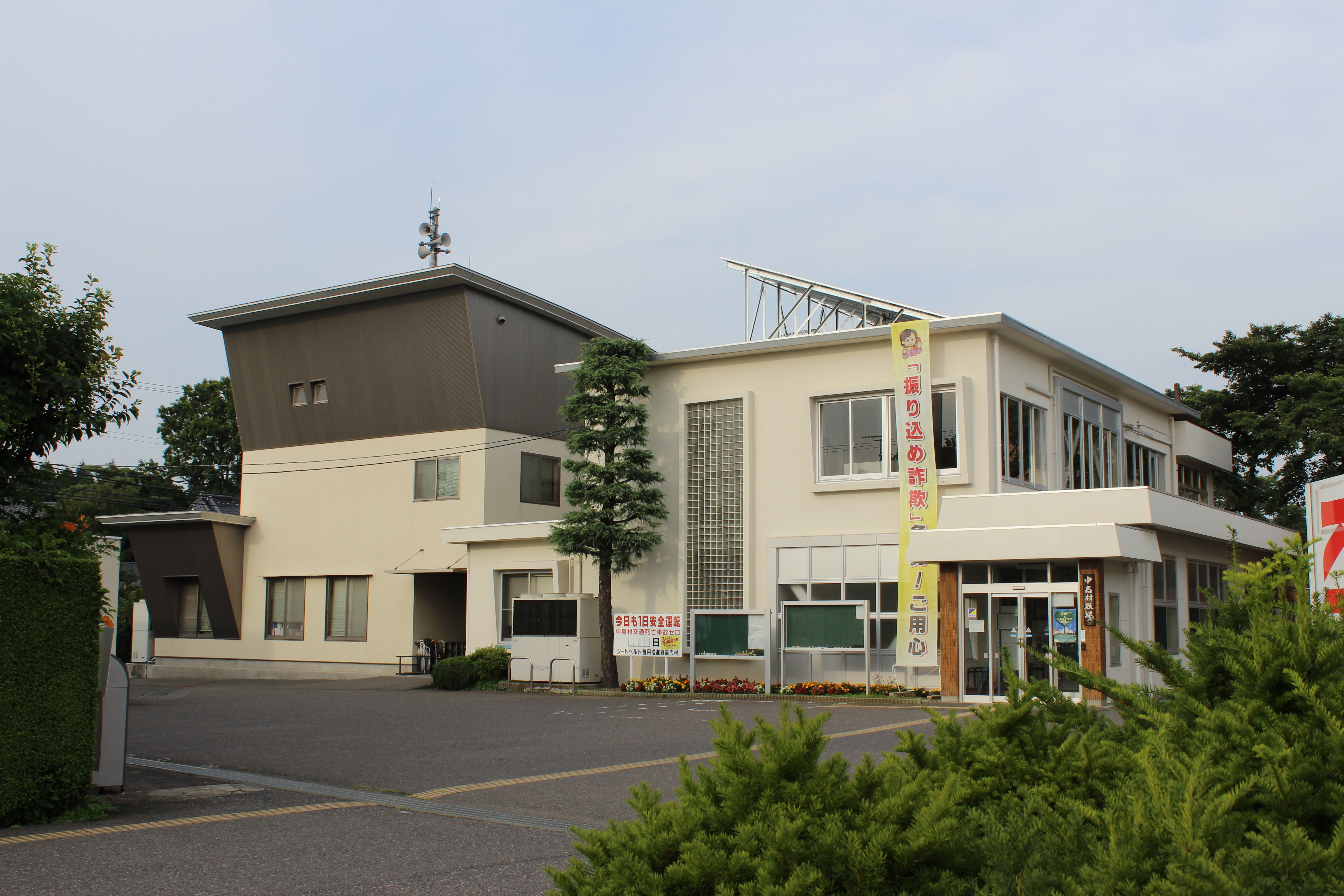 中島村役場（〒961-0192 福島県西白河郡中島村大字滑津字中島西11番地の1）